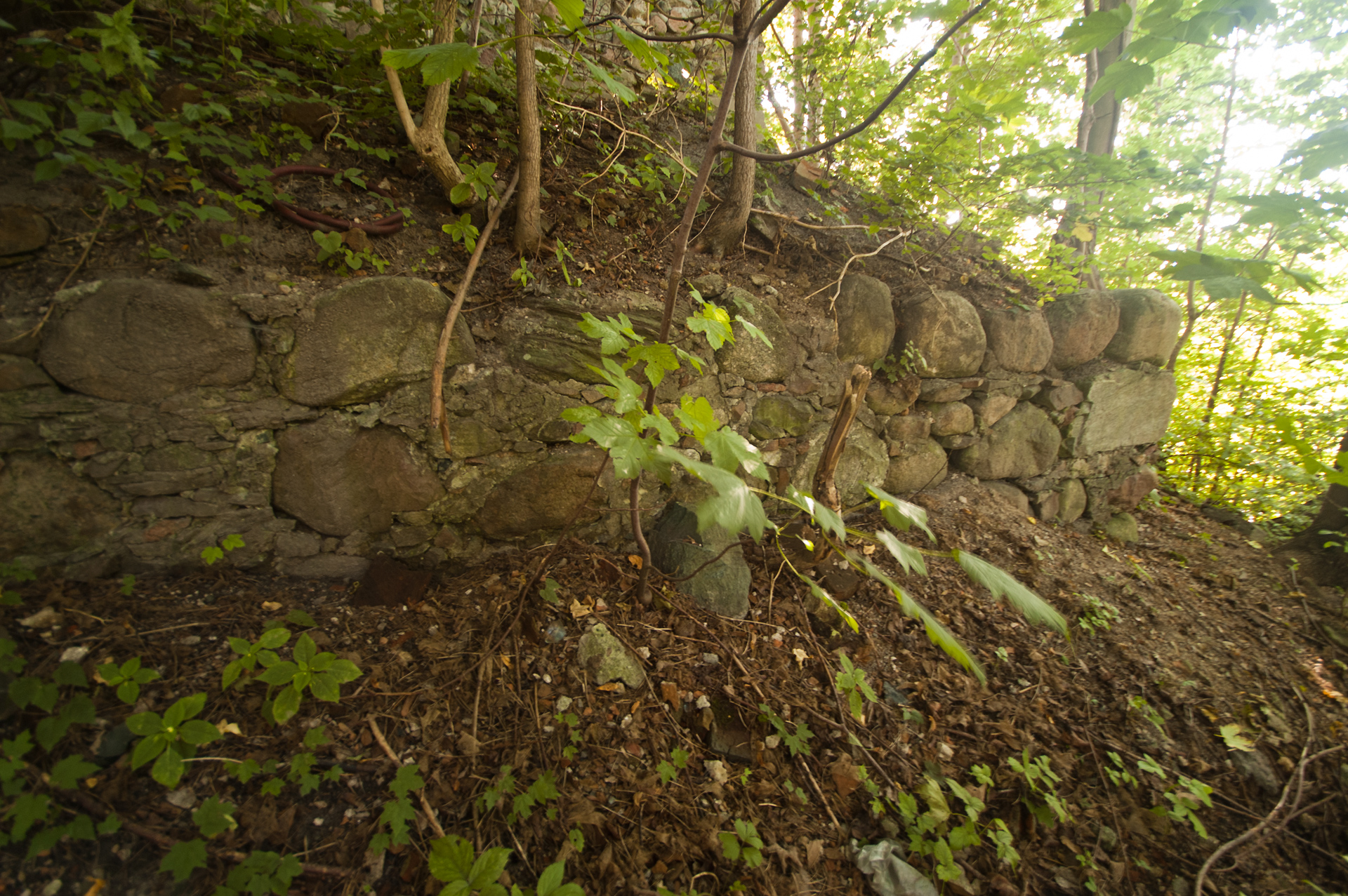 fragmenty murów przyziemia zamku Miłakowo, Miłakowo (miasto)